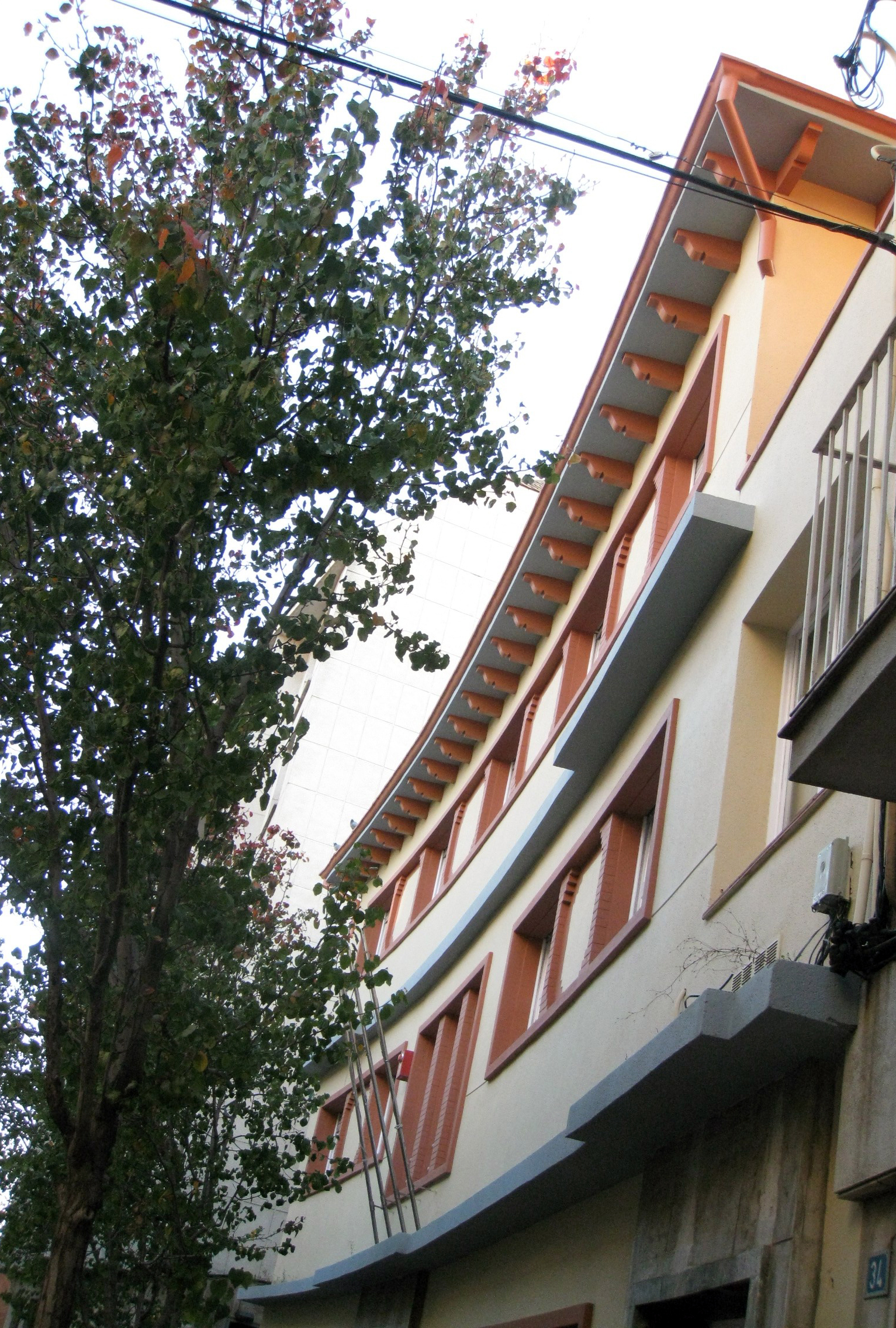 Edifici de l'IMSAV, antics Jutjats, conegut popularment com la Gota de Llet, al carrer de la Unió núm. 36-38 (Terrassa). Obra noucentista-racionalista de Lluís Muncunill del 1930.